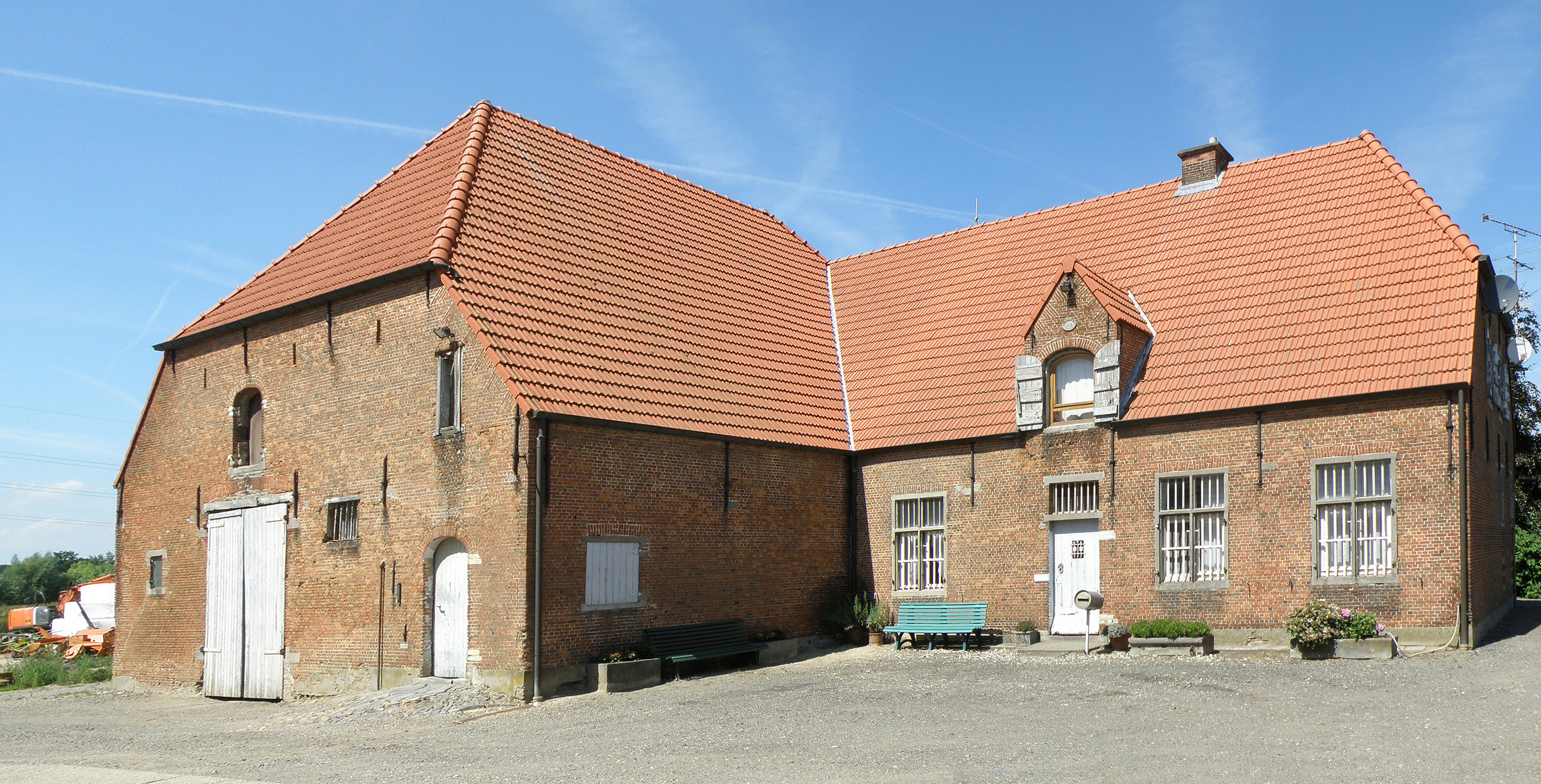 Boechout (prov. Antwerpen, België). Hoeve De Langmorter, 1776.